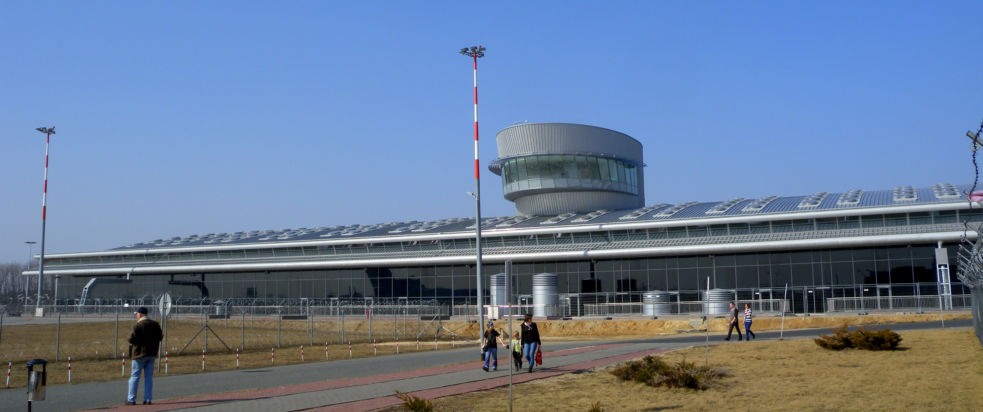 Terminal 3 Port Lotniczy Łódź im. Władysława Reymonta